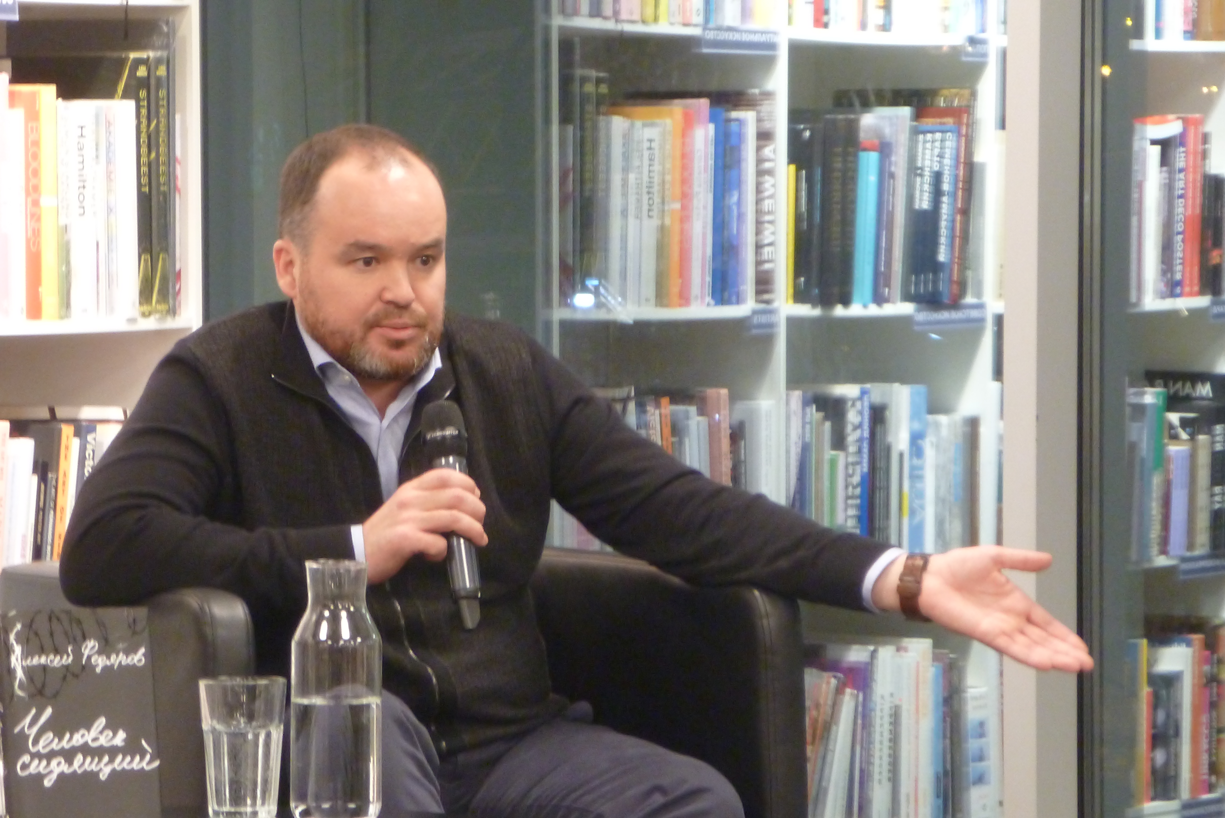 Алексей Федяров презентует книгу в Ельцин-центре (книжный магазин "Пиотровский") 23 января 2019 года